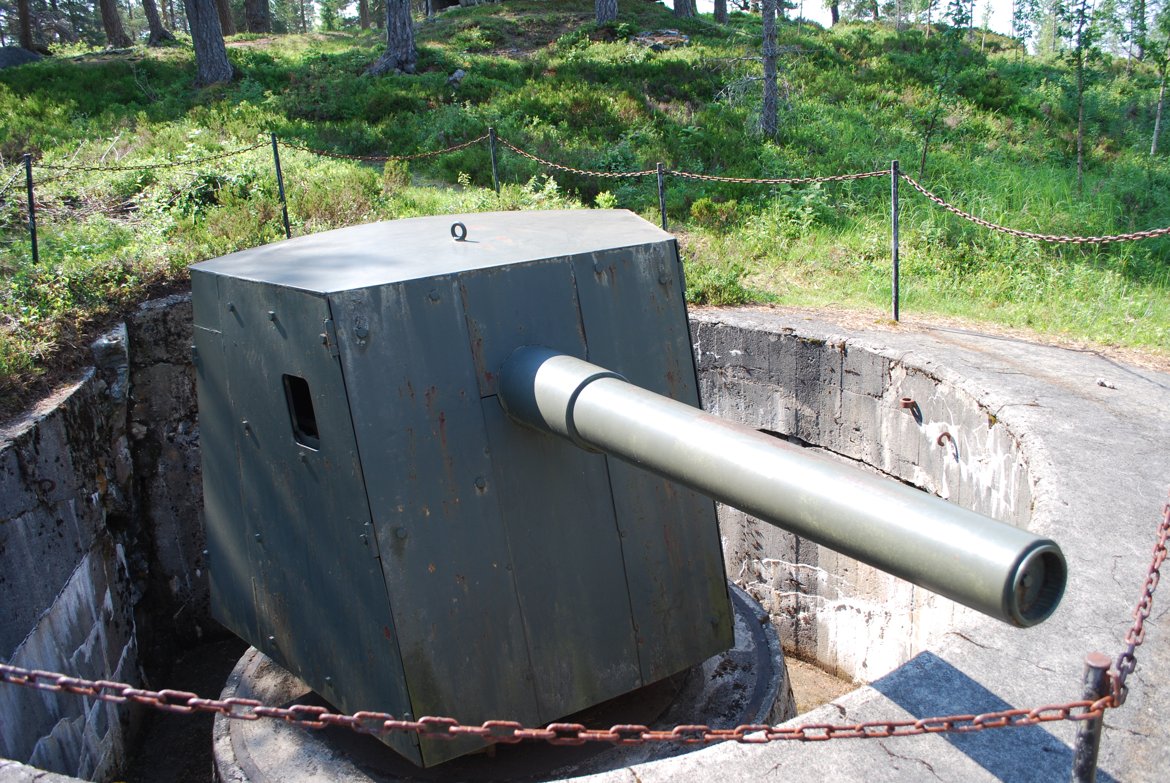 10,5 cm kanon på Hegra festning.